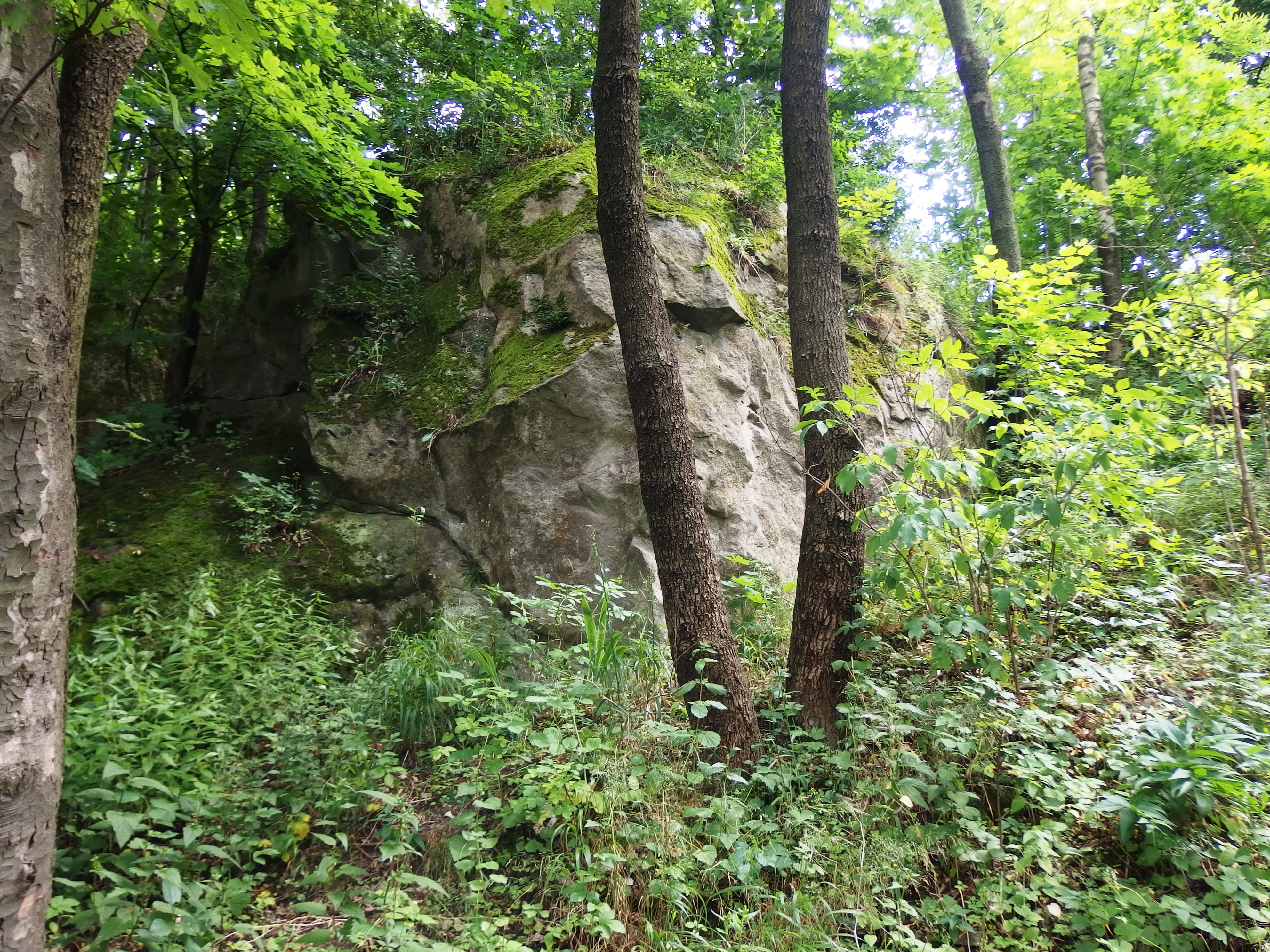 Štramberk, skála Rudý.